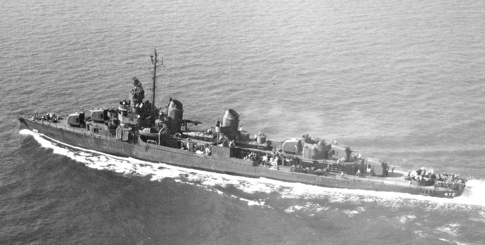 The U.S. Navy destroyer USS Guest (DD-472) underway in 1943.